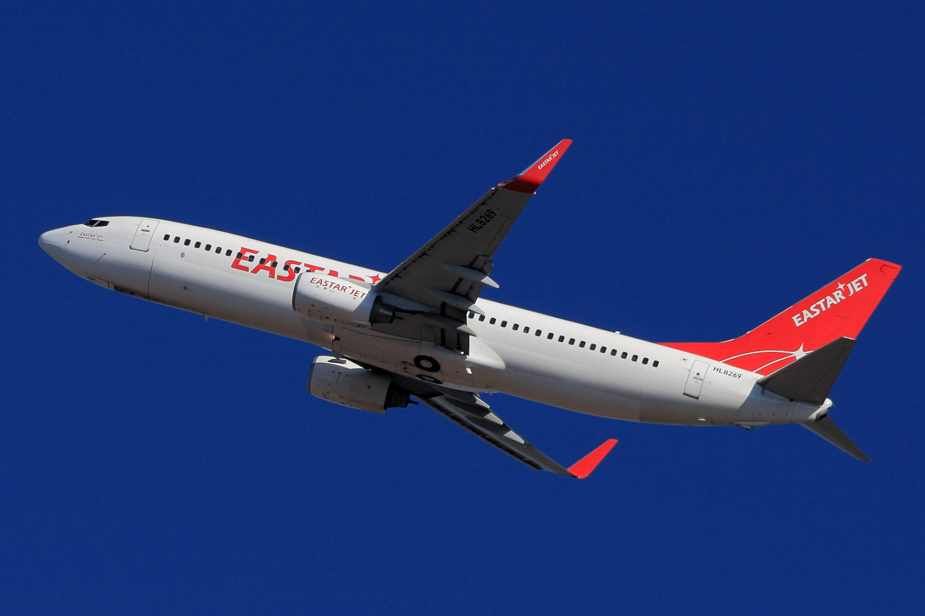 成田国際空港で撮影された、イースター航空のボーイング737-800型機